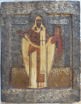 Святитель Леонтий Ростовский, басменный оклад. Втор. пол. XVI в. 28,5x22,5.